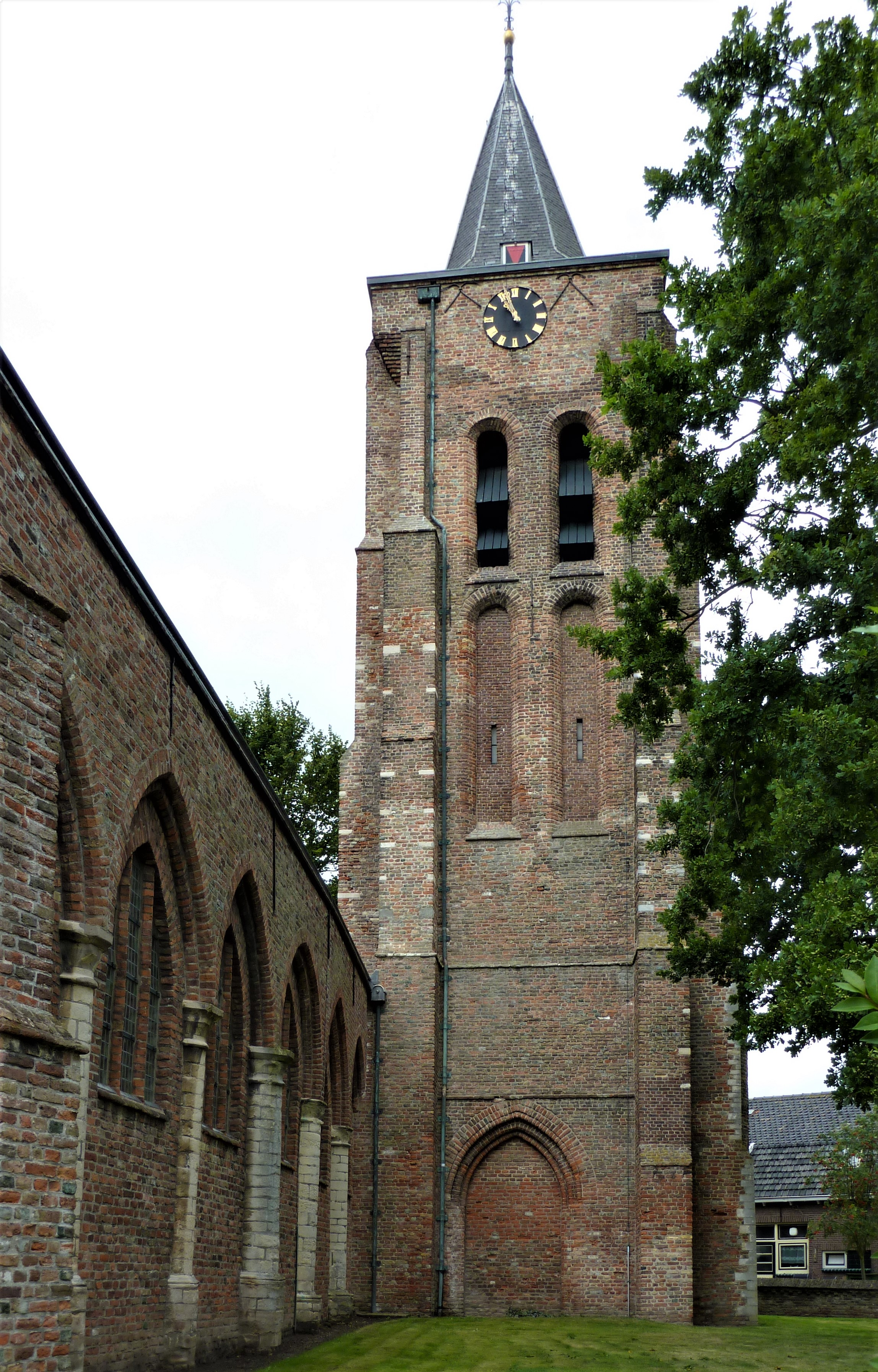 Onze-Lieve-Vrouwekerk (Waarde)